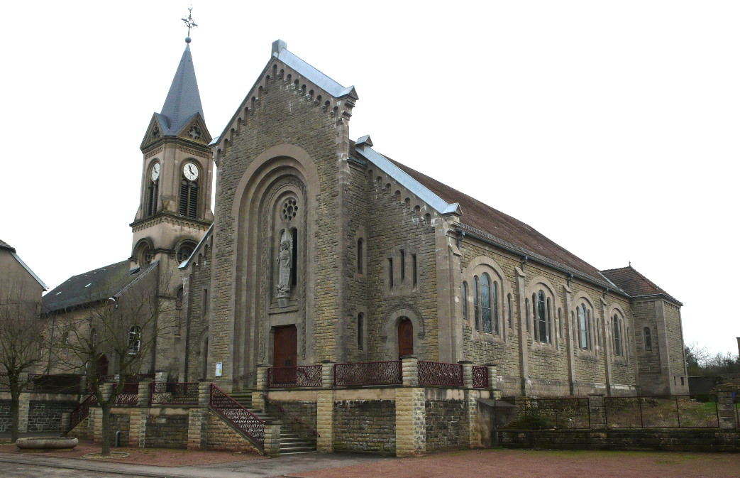 Kierch vun Angevillers.